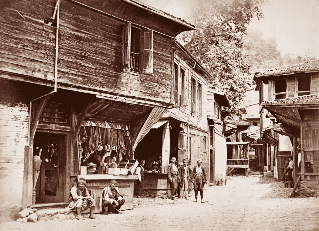 1900'lü yılların başında İstanbul